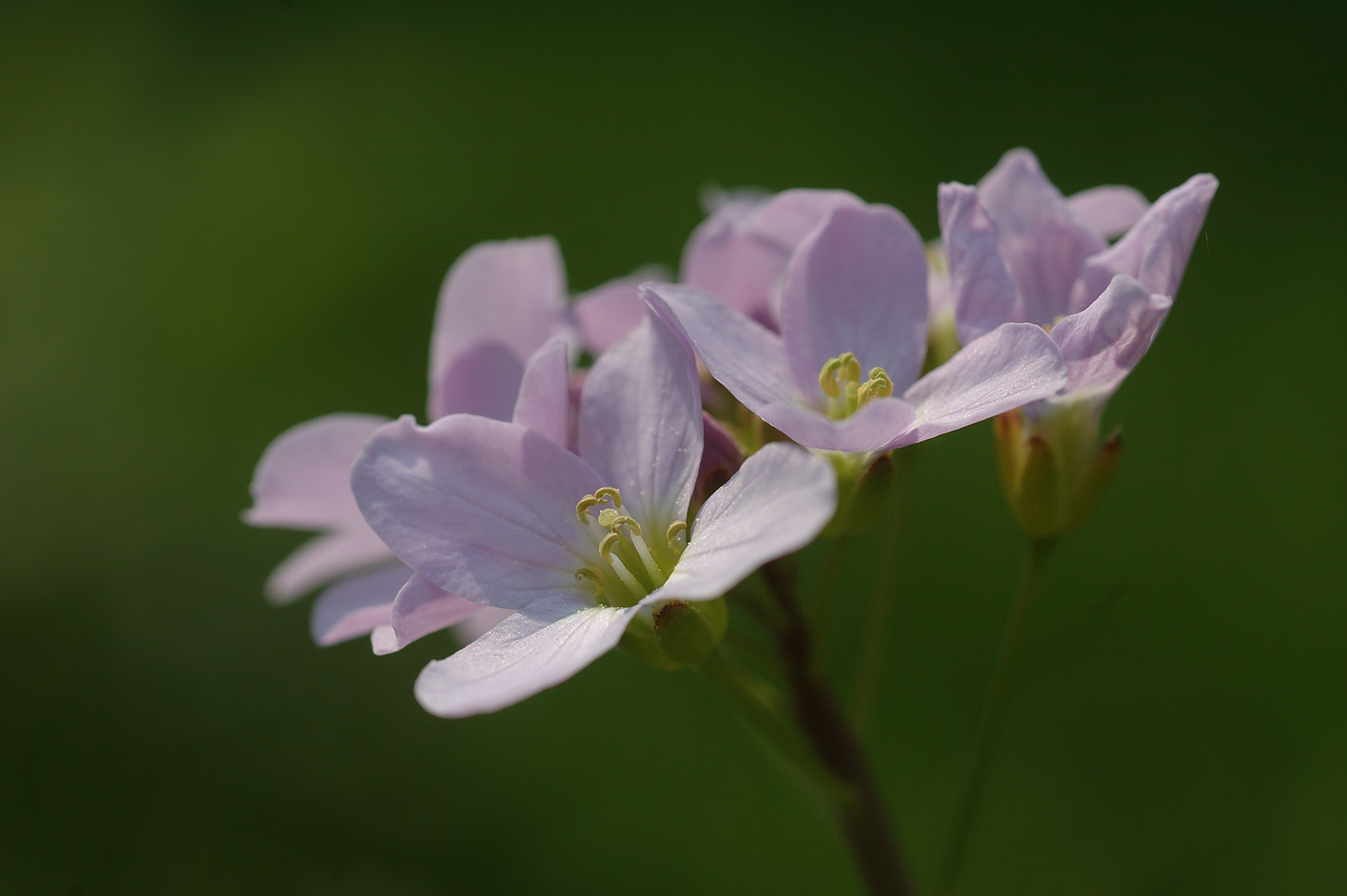 Wiesenschaumkraut (Cardamine pratensis)